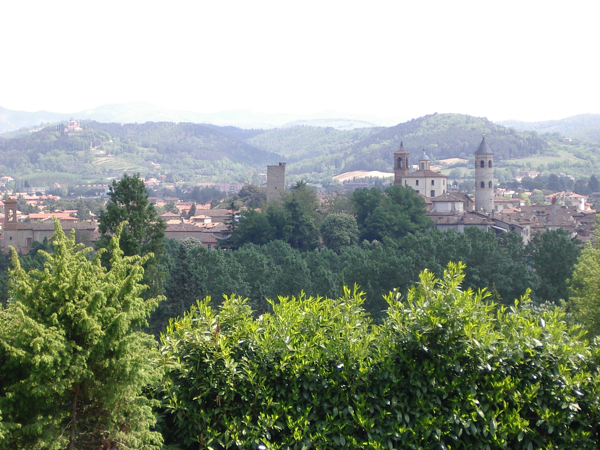 Città di Castello Panorama Omnbrie Italy